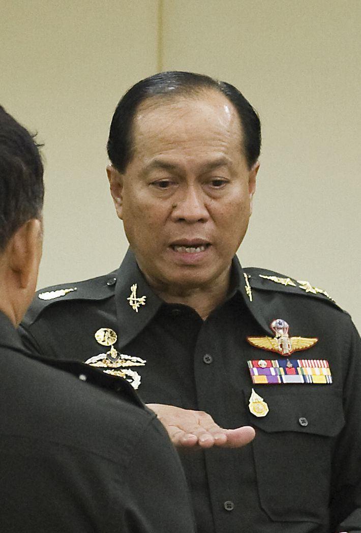 พลเอก อนุพงษ์ เผ่าจินดา หลังการประชุมคณะกรรมการอำนวยการรักษาความมั่นภายในราชอาณาจักร ณ ห้องประชุมงบประมาณ ชั้น 3 อาคารรัฐสภา 3 14 ตุลาคม 2552 (The Official Site of The Prime Minister of Thailand Photo by พีรพัฒน์ วิมลรังครัตน์)